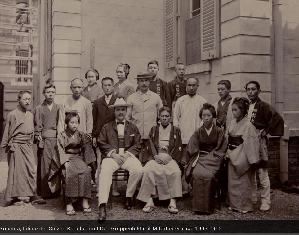 Desco von Schulthess, Zürich, Schweiz